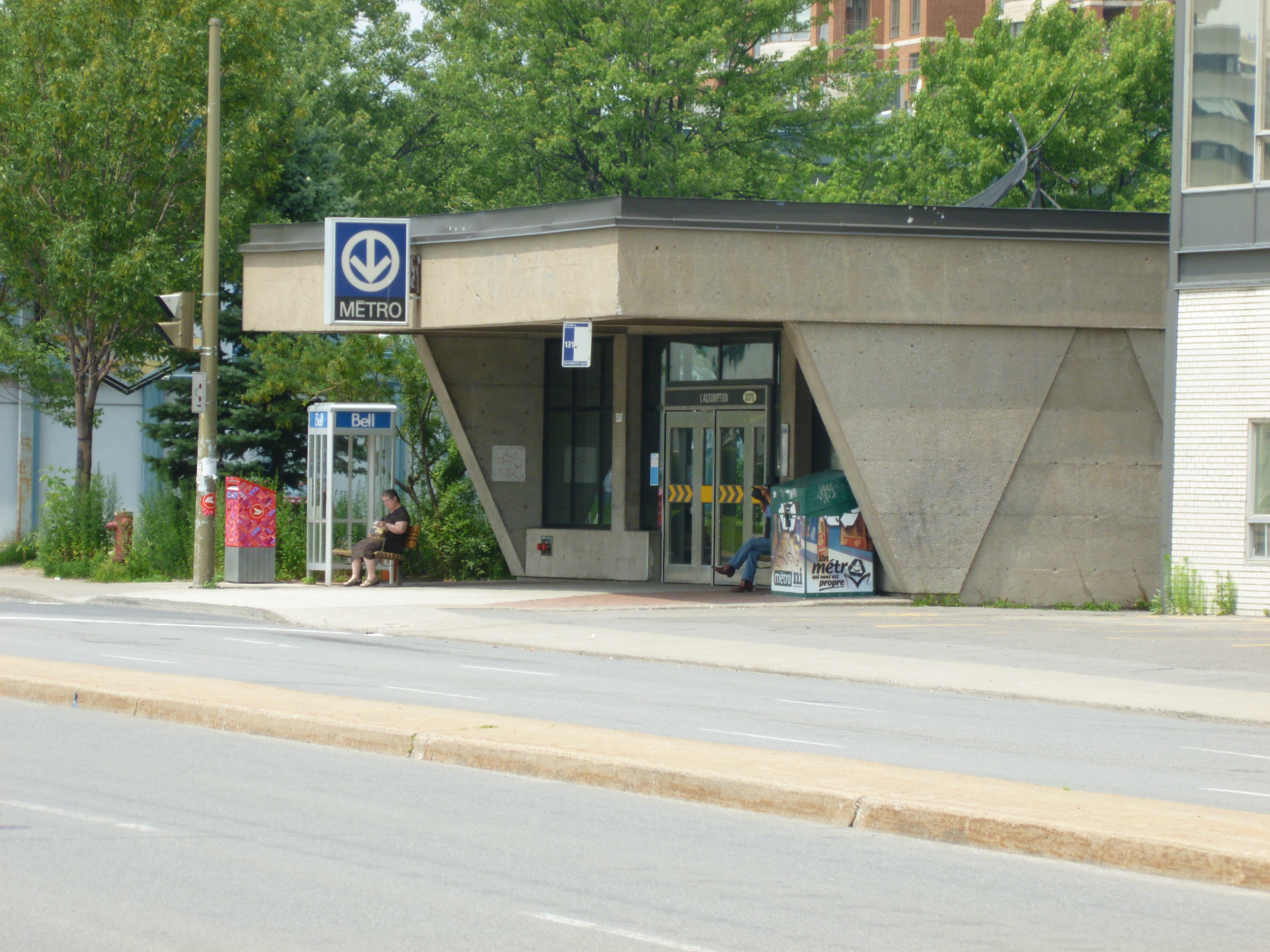 L'Édicule de la station de métro Assomption à Montréal, Québec, Canada